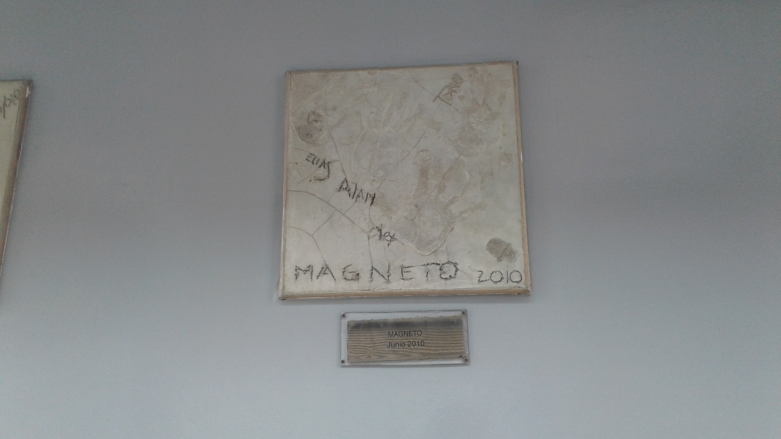 Banda Magneto de México en Lima - Perú.